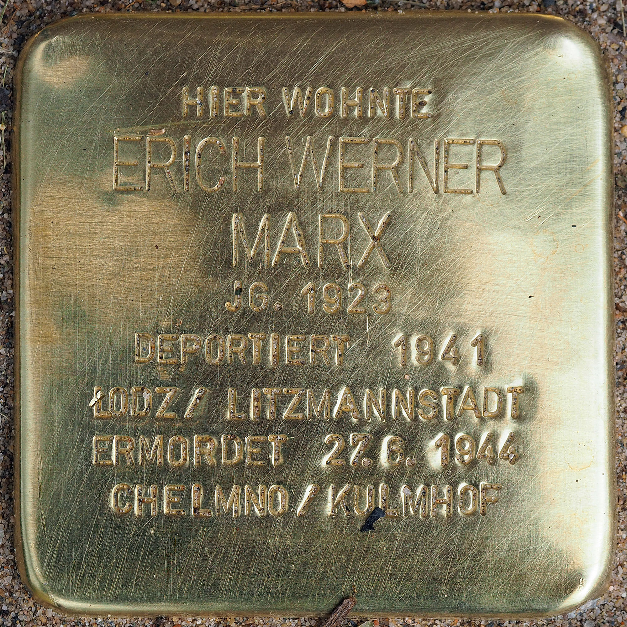 Stolpersteine Suechteln: Marx, Erich Werner